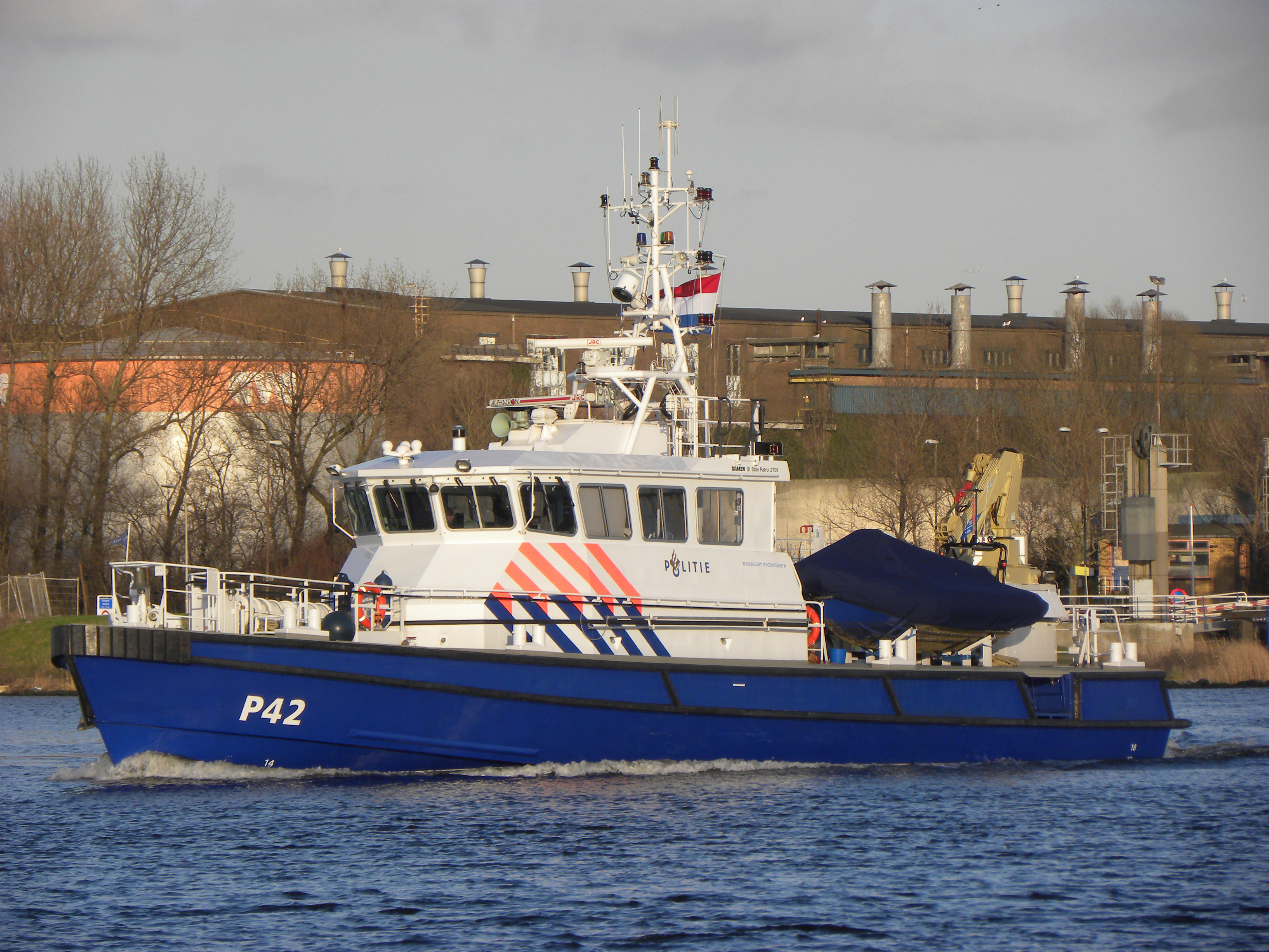 P 42 Damen Stan Patrol 2706